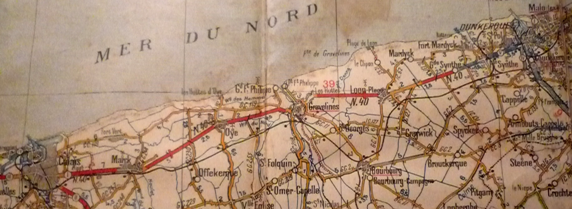 Tracé de l'ancienne Ligne Coudekerque-Branche - Les Fontinettes, Nord-Pas-de-Calais, France